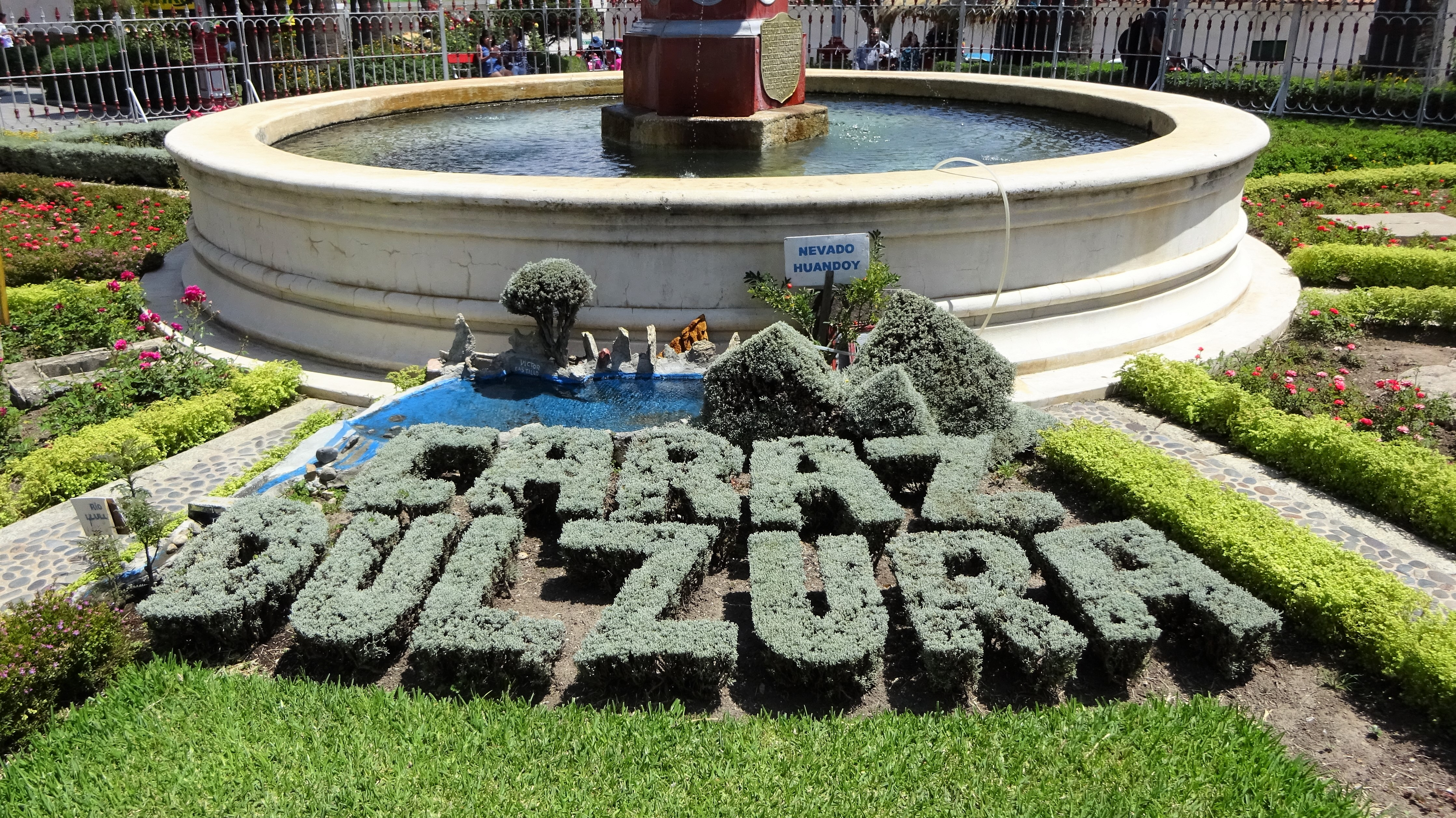 Pflanzung am Plaza de Armas von Caraz, Peru mit dem Werbemotto der Stadt